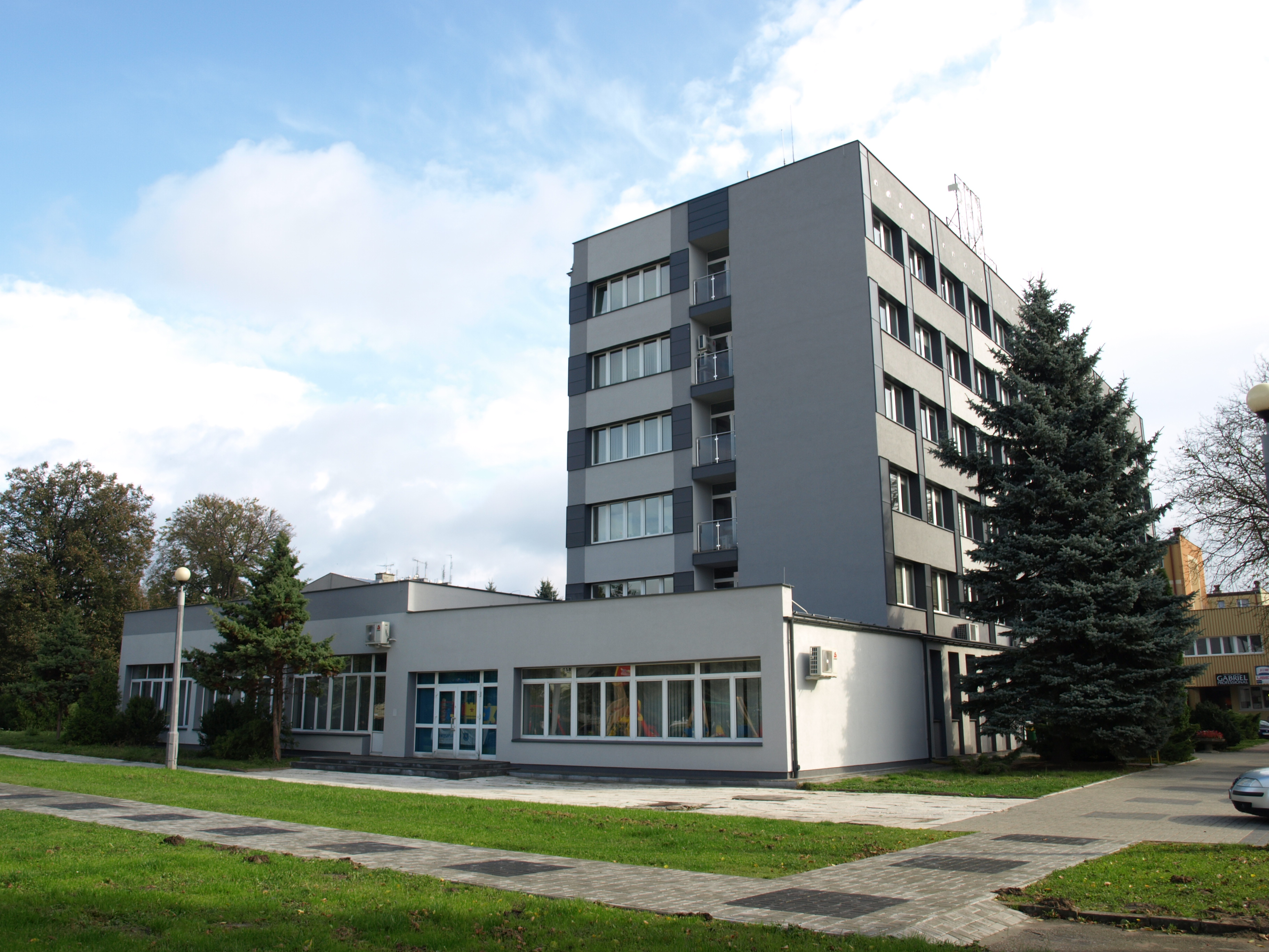 Budynek Starostwa Powiatowego w Przeworsku